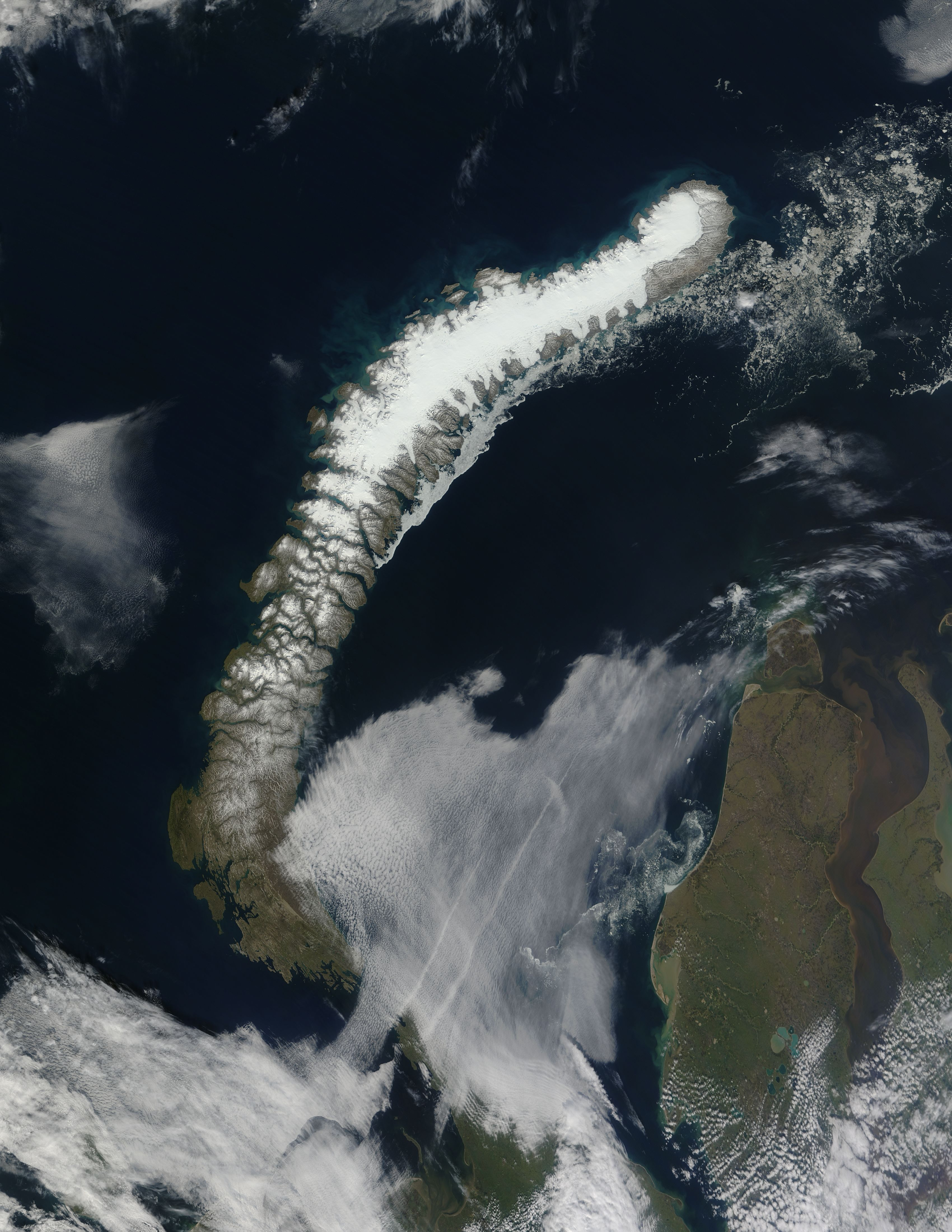 L'arcipelago russo di Novaja Zemlja.